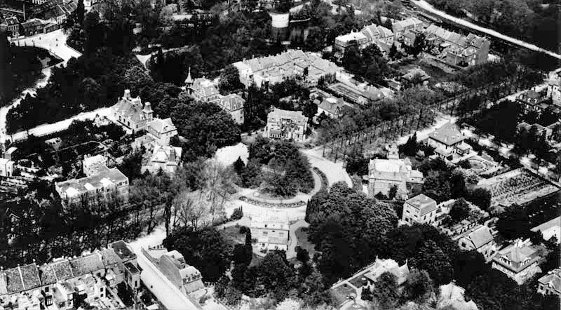 Luchtfoto van het rond-point aan de Prins Bisschopsingel in Maastricht omstreeks 1925-30. Het karakter van de straat veranderde radicaal na de bouw van de Kennedybrug (1965-68). Fotocollectie RHCL Maastricht, GAM 13580.